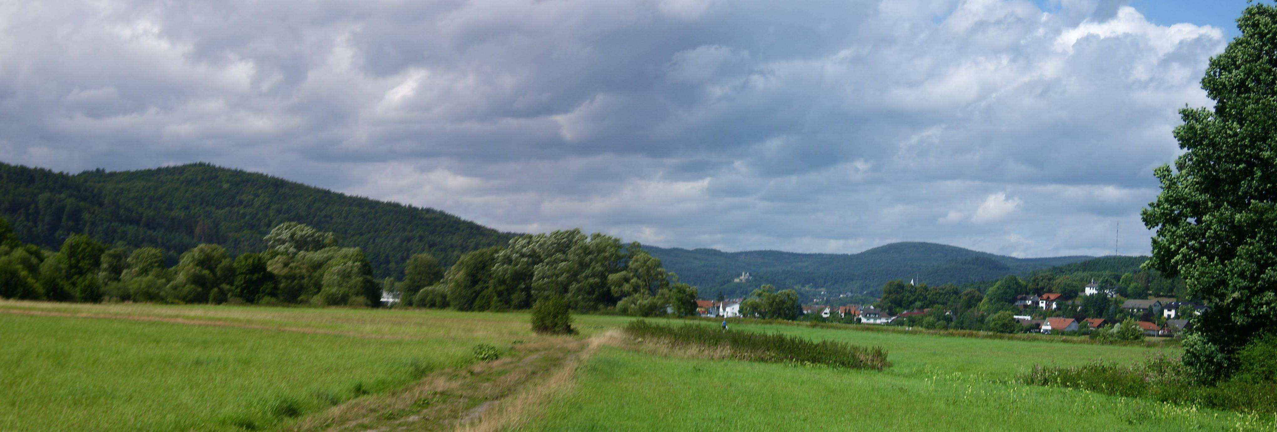 Blick von der Lahnaue bei Kombach auf Biedenkopf und die 631m hohe Hainpracht (rechts des Schlosses), einen Ausläufer der 674m hohen Sackpfeife (rechts im Hintergrund, Antenne) sowie auf Ostausläufer des 561m hohen Schwarzenberges (links)